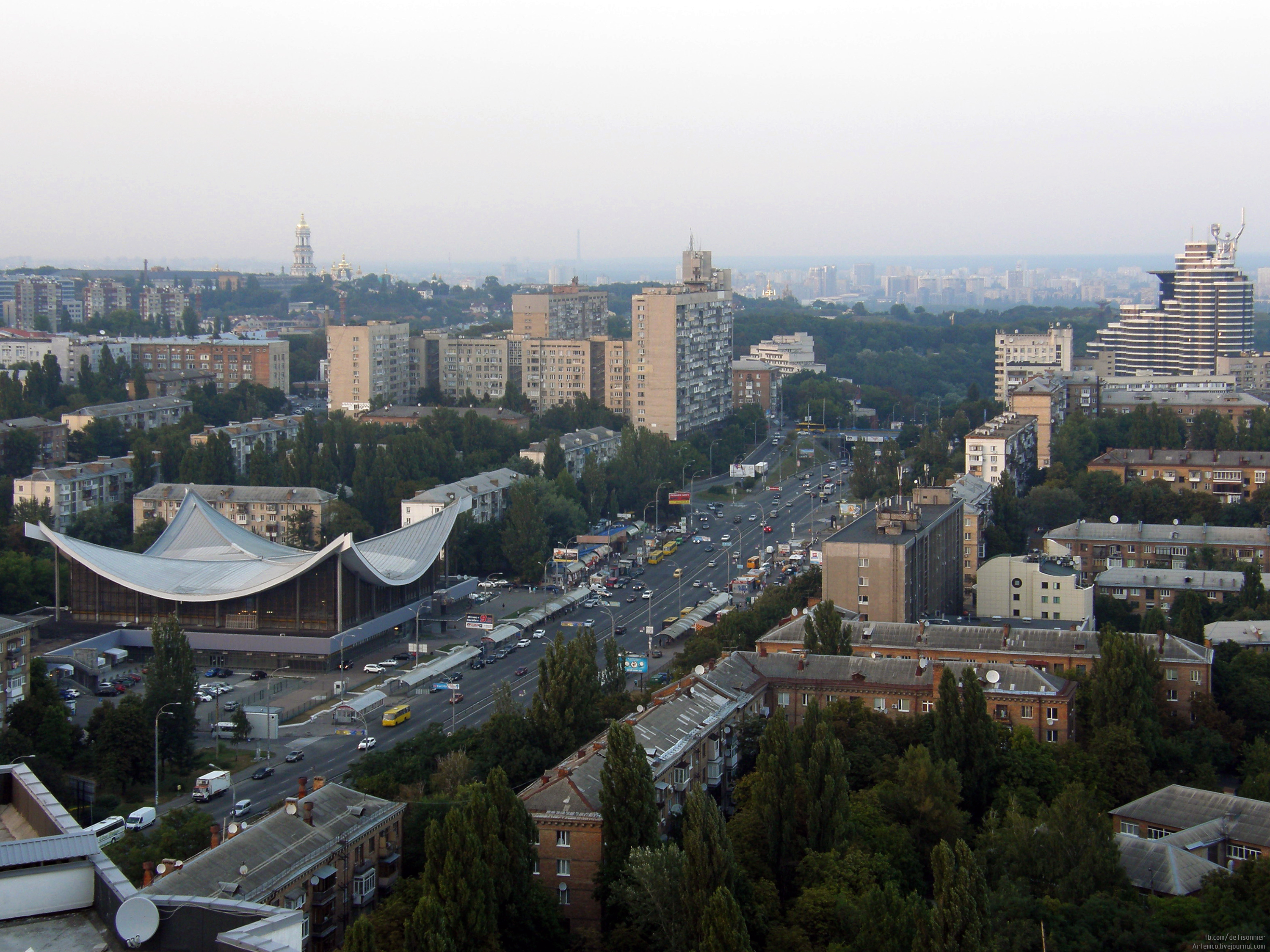 бульвар Дружбы Народов